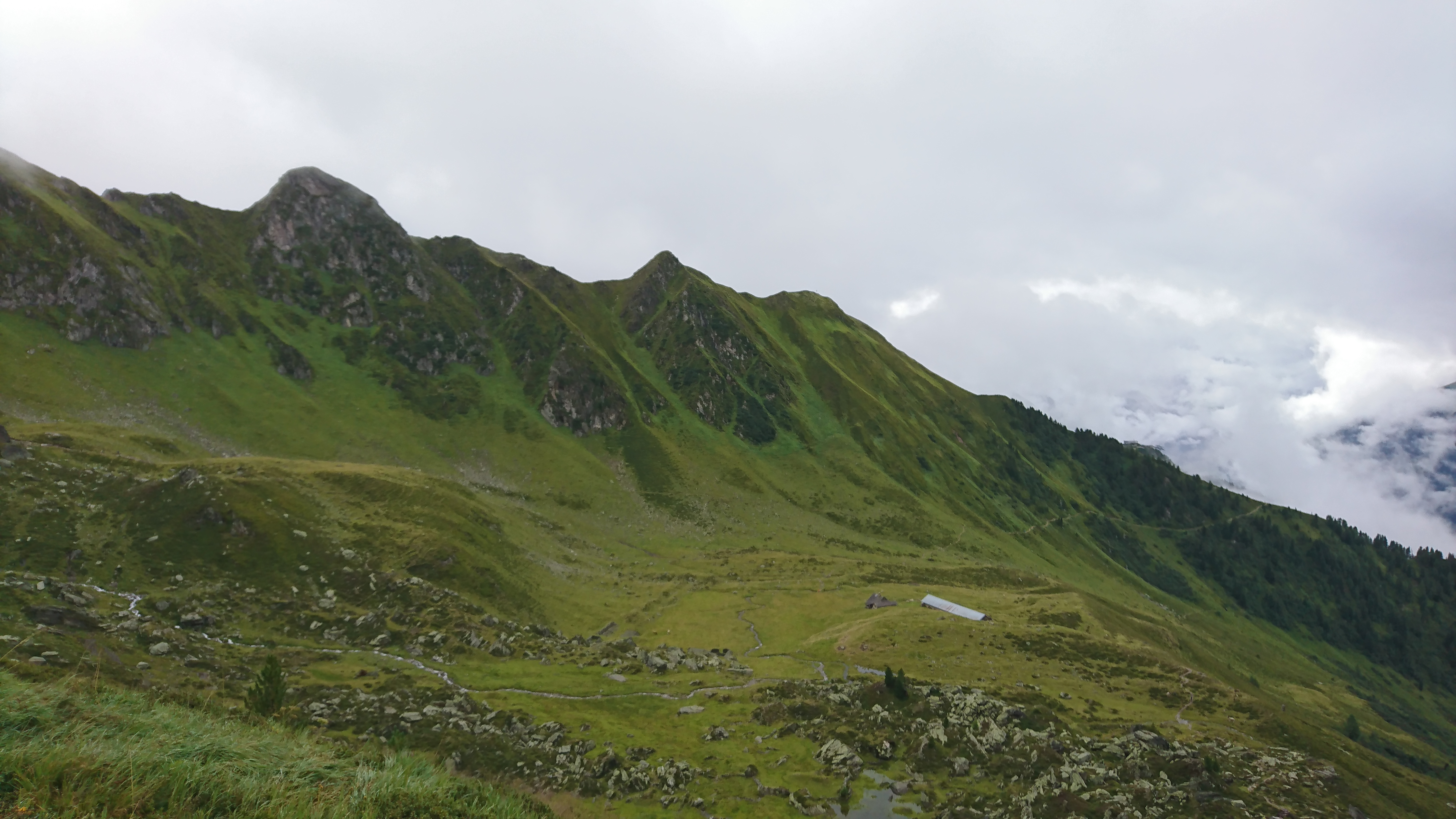 Ausblick in Richtung Nordwesten aus dem südlichen Weg zwischen der höheren Station der Ahornbahn und der Karl-von-Edel-Hütte.